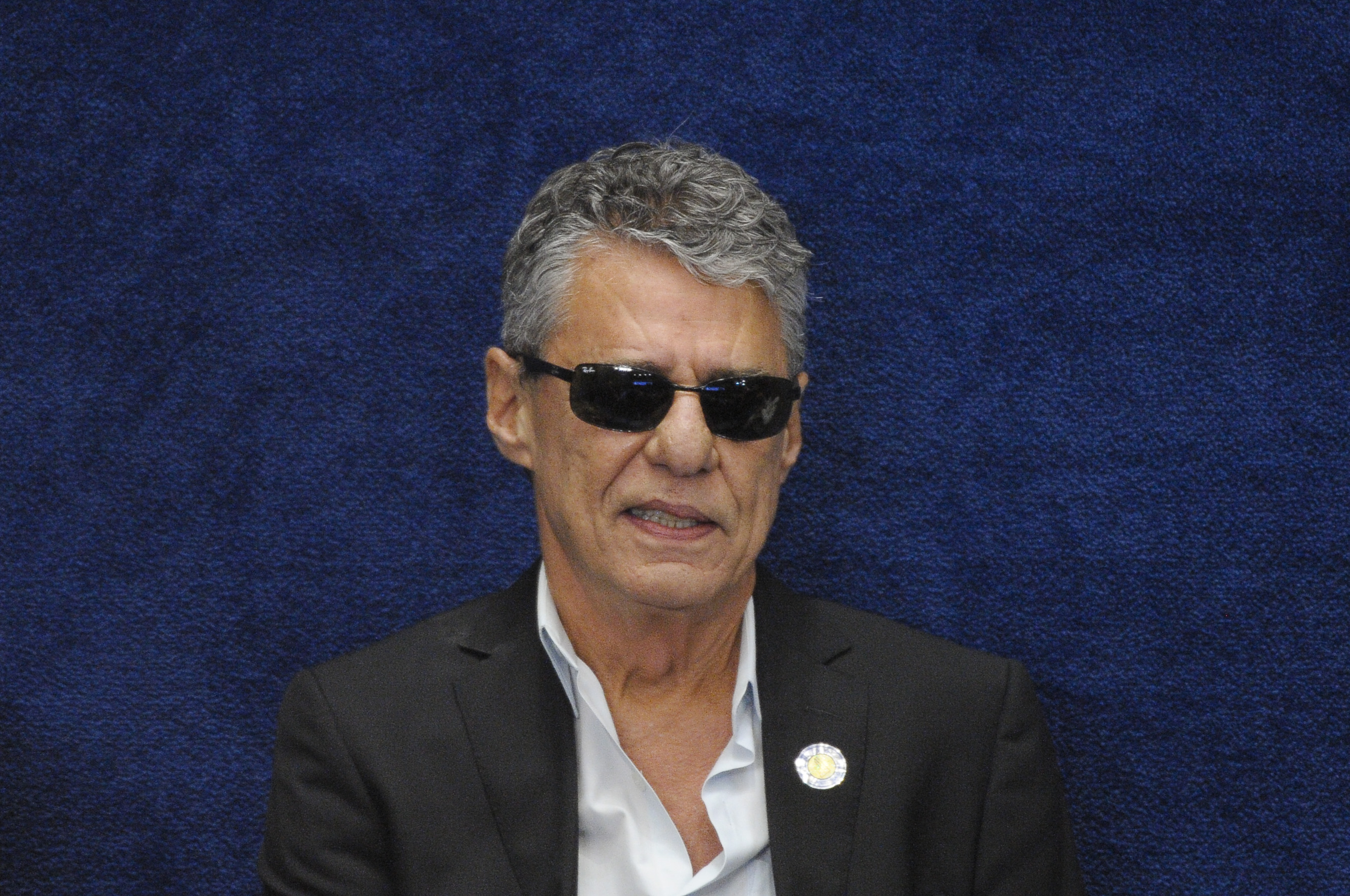 Plenário do Senado Federal durante sessão deliberativa extraordinária para votar a Denúncia 1/2016, que trata do julgamento do processo de impeachment da presidente afastada Dilma Rousseff por suposto crime de responsabilidade. Em destaque, cantor Chico Buarque. Foto: Pedro França/Agência Senado